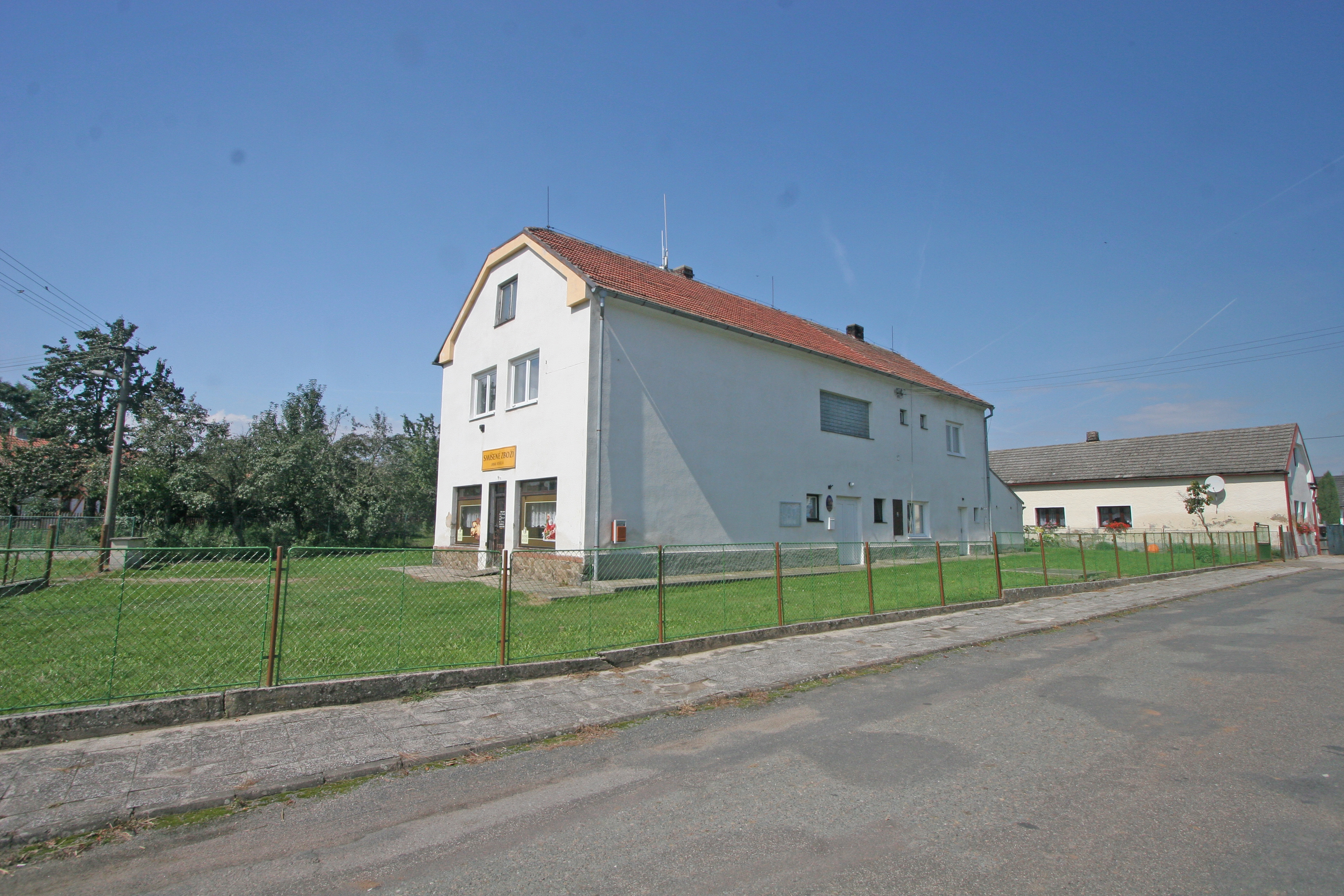 Selmice obecní úřad